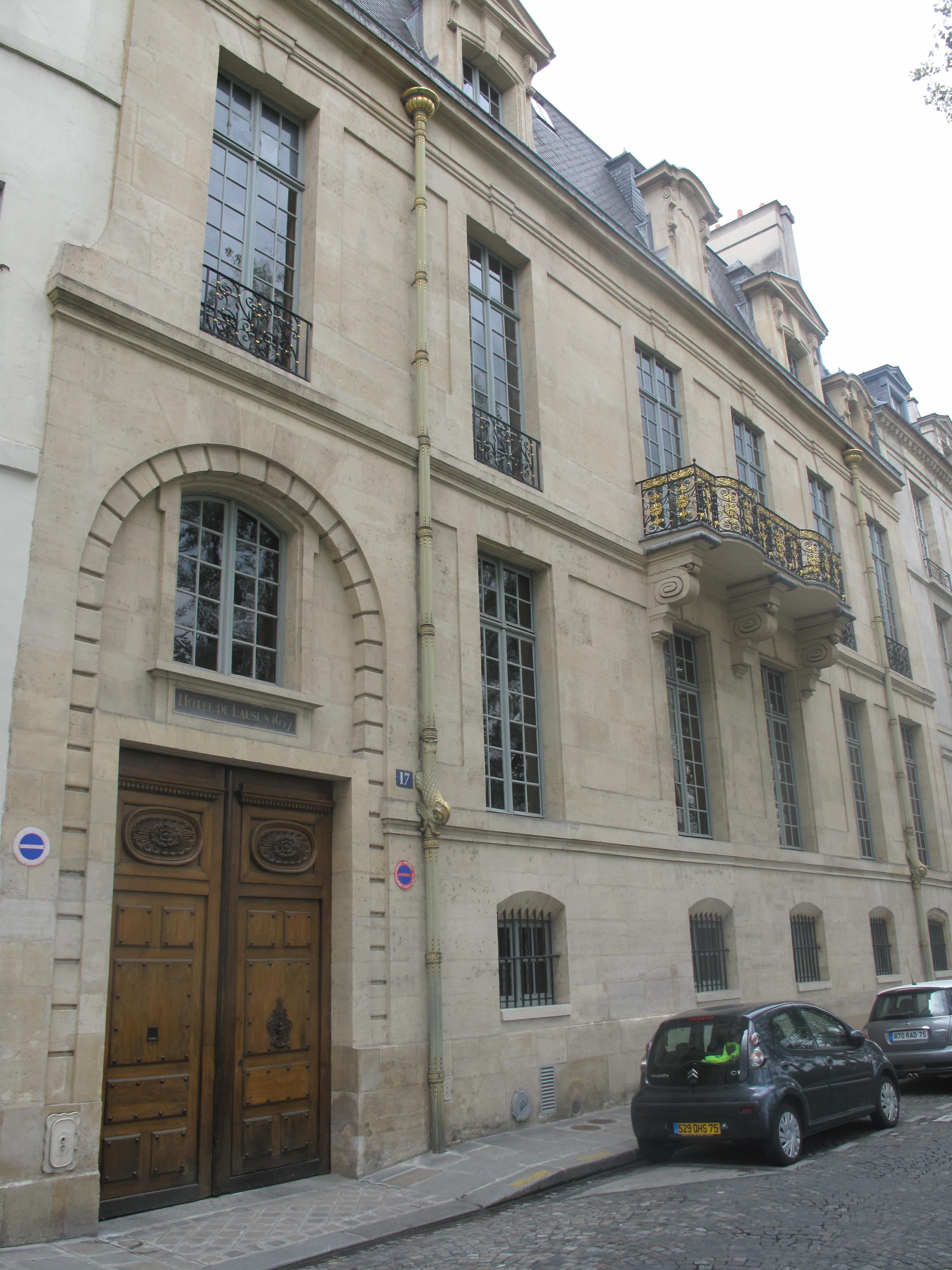 Hôtel de Lauzun, 17 quai d'Anjou, Paris 4e arr. sur l'île de la Cité.